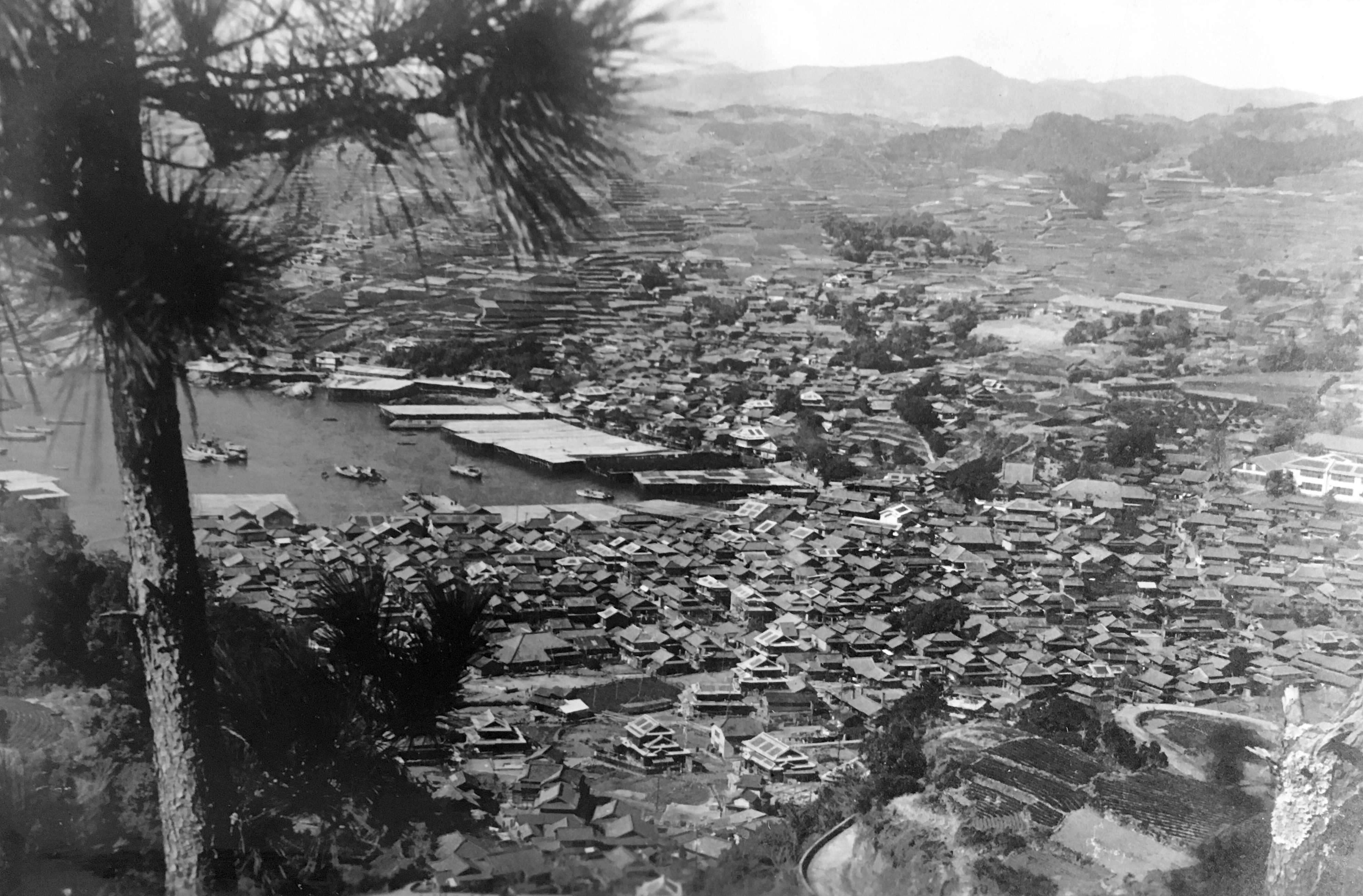 式見港、昭和25年 (Shikimi bay, 1950)